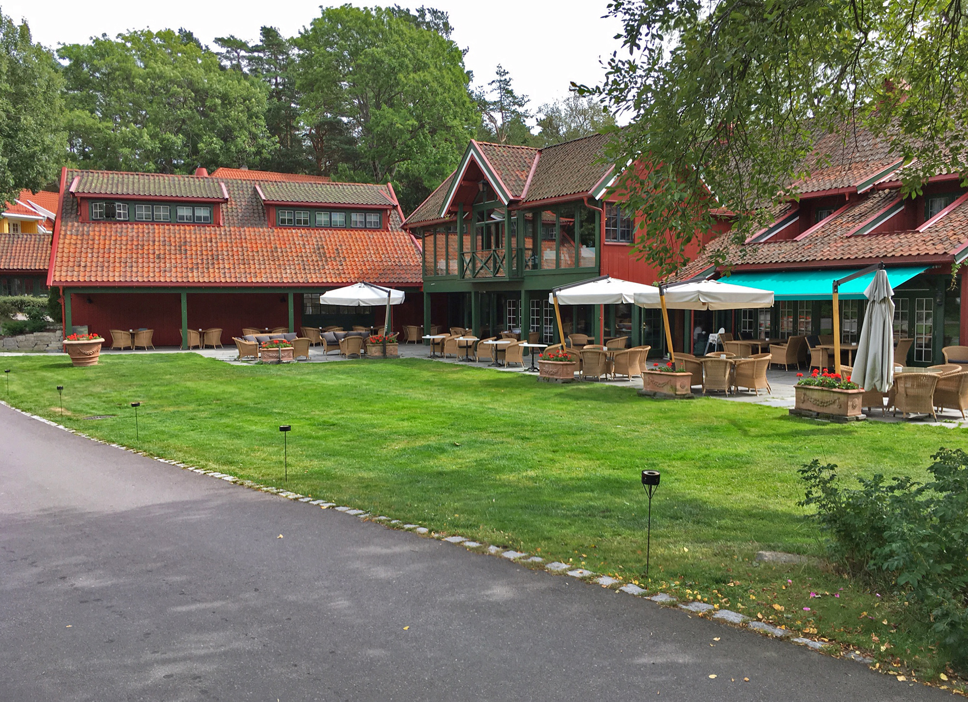 Engø Gård Hotel & Restaurant 2017